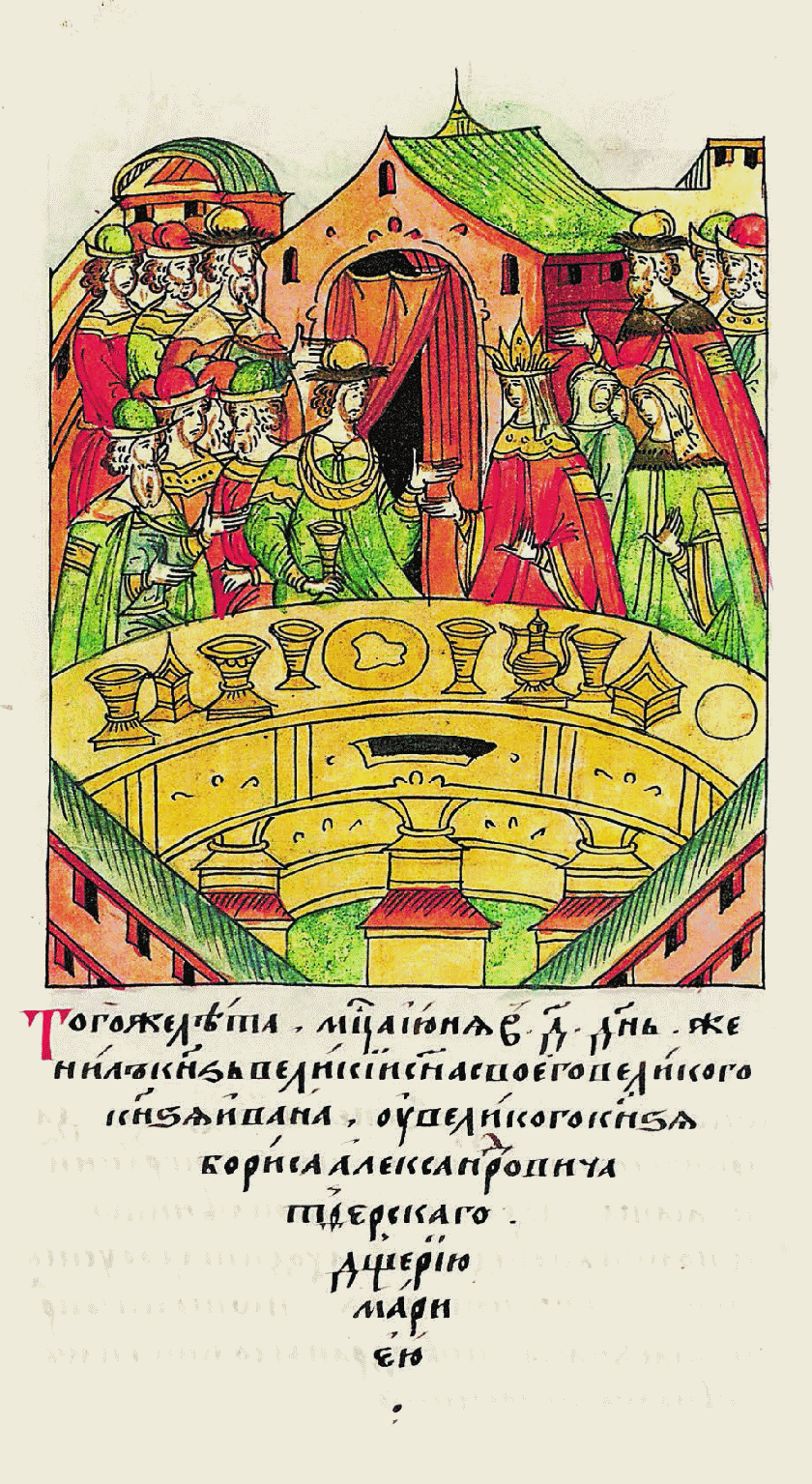 В том же году месяца июня в четвертый день женил великий князь сына своего великого князя Ивана у великого князя Бо- риса Александровича Тверского на дочери его Марии.